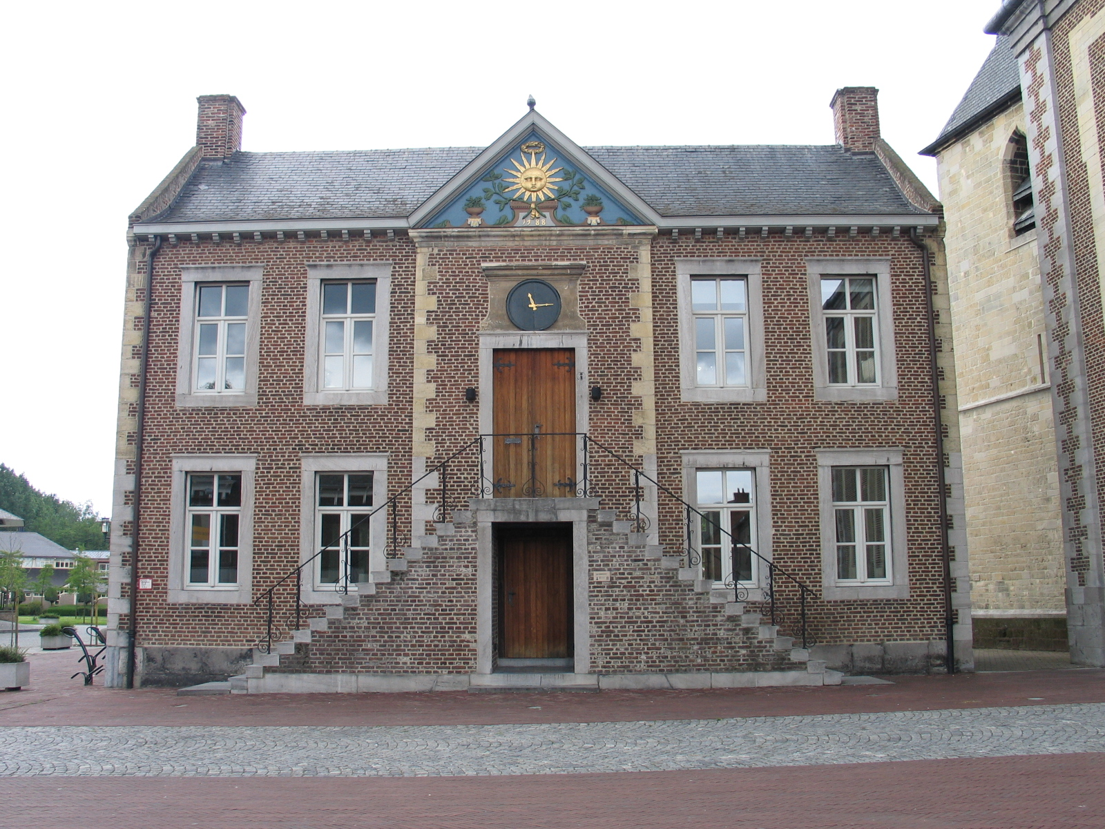 Oud gemeentehuis van Zonhoven - eigen foto